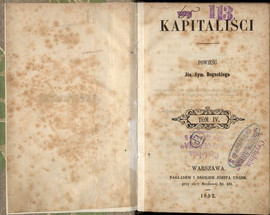 Kapitaliści. T. 4